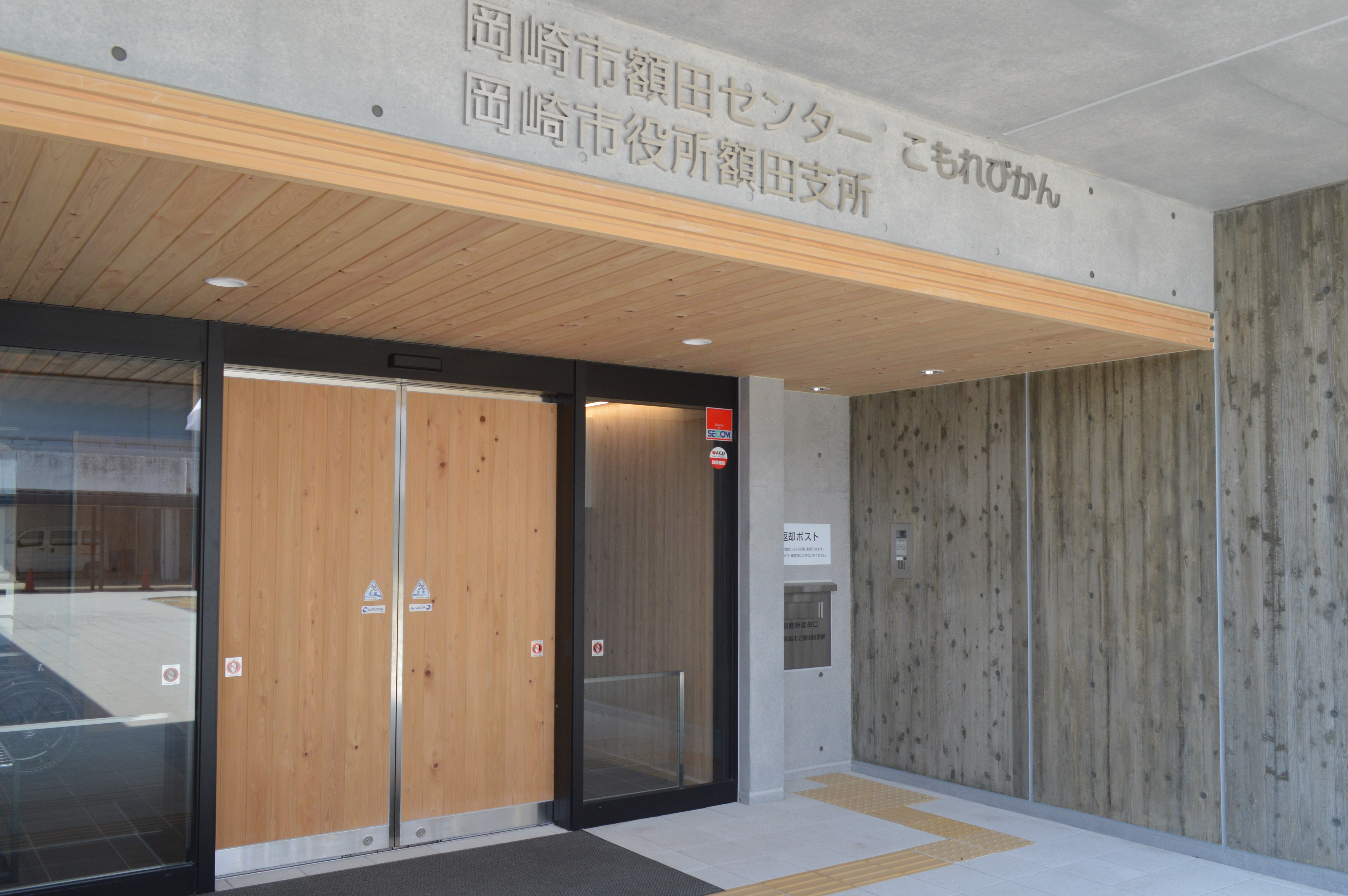 愛知県岡崎市の岡崎市額田センター。入口。2018年2月オープン。